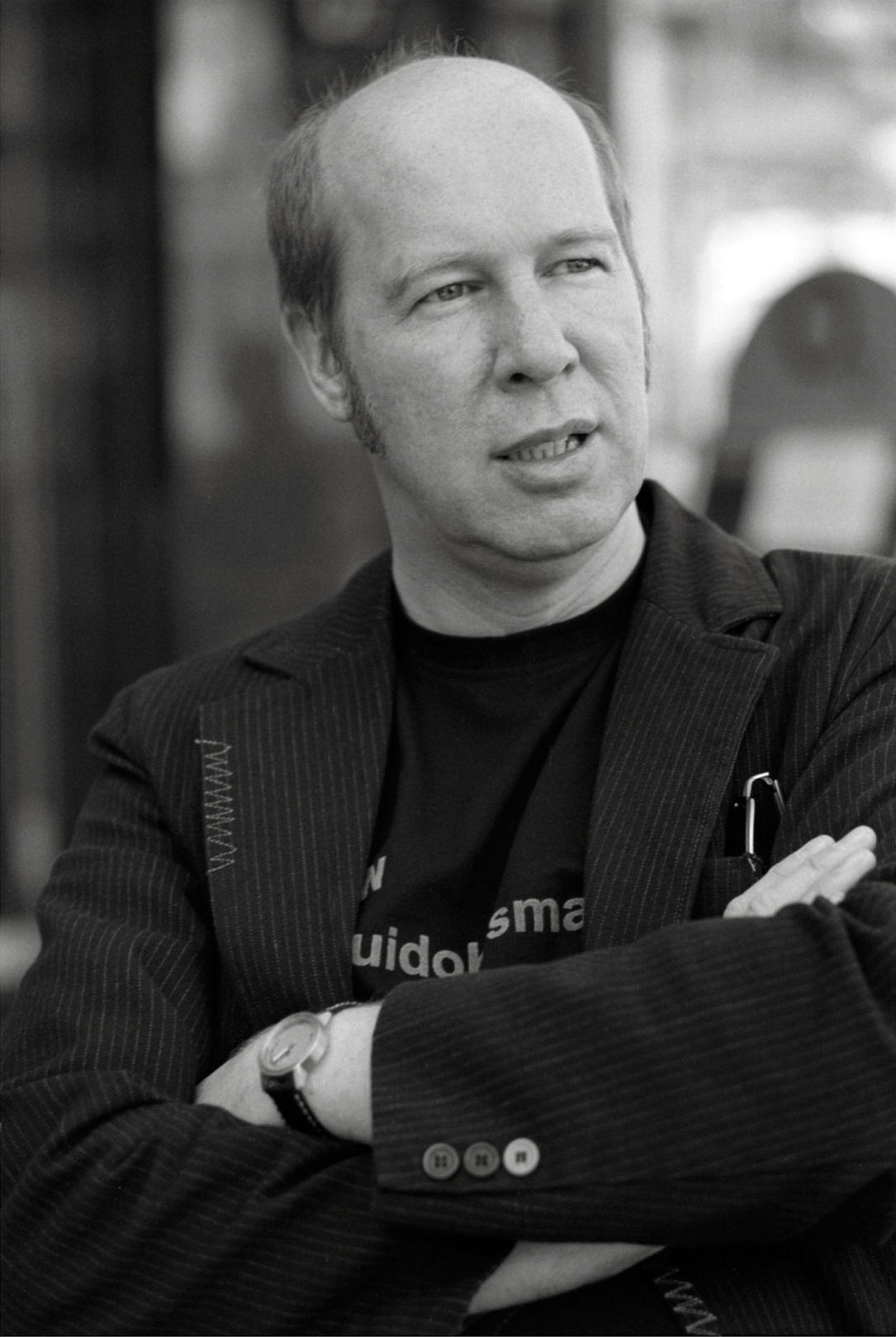 Autor Guido Kasmann